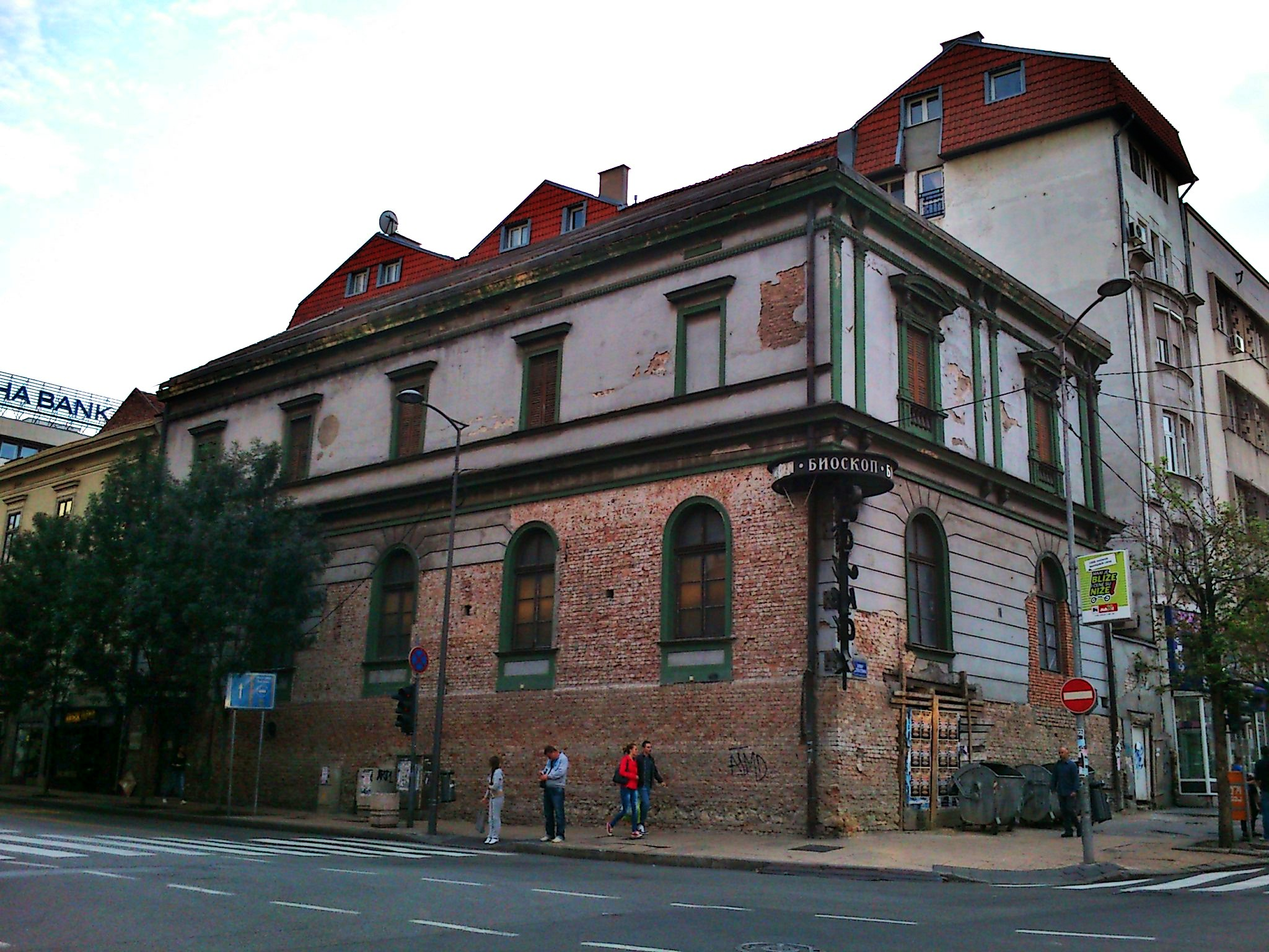 Биоскоп „Балкан“